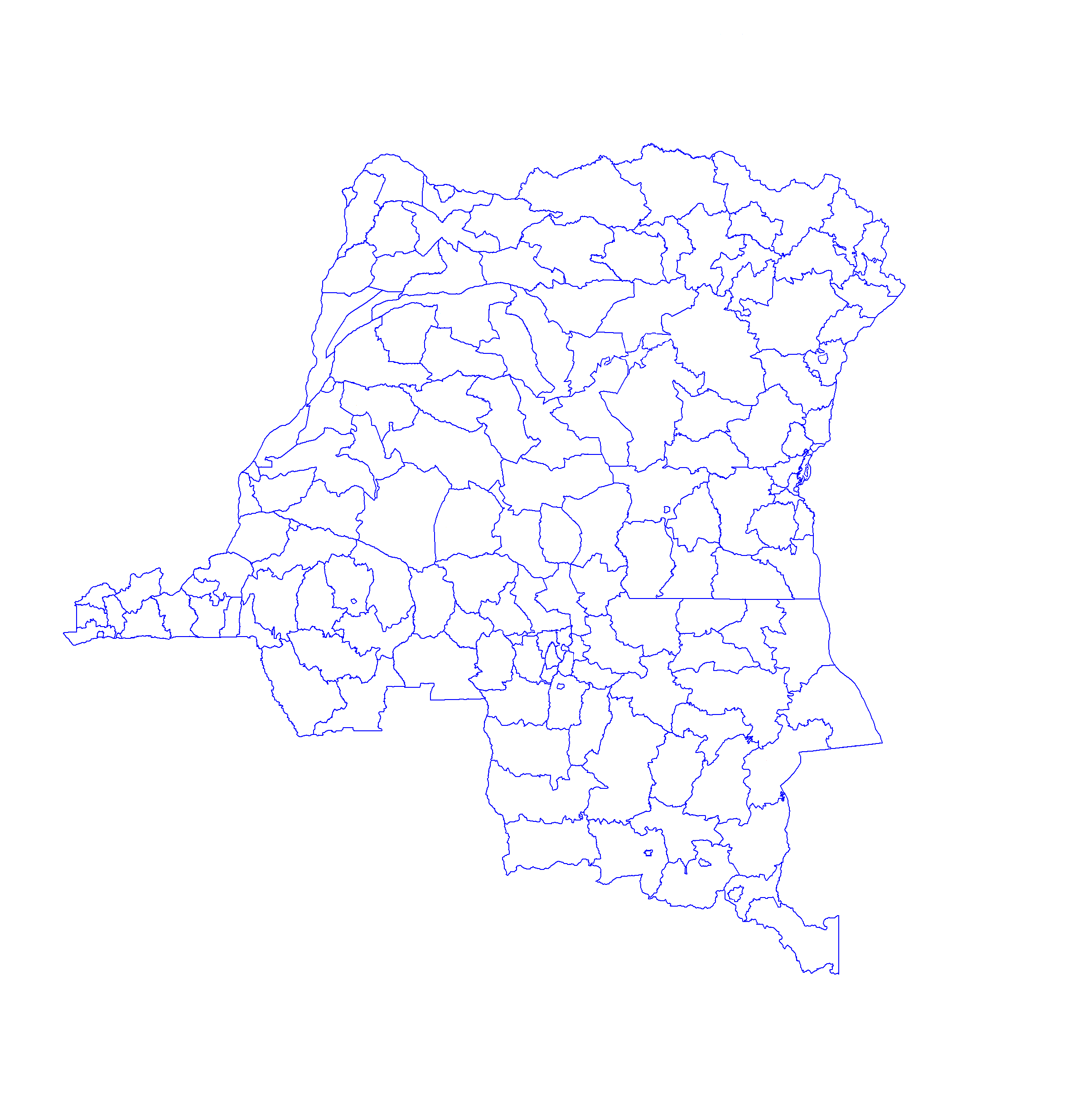 Mapa de los Territorios de la República Democrática del Congo (2017)